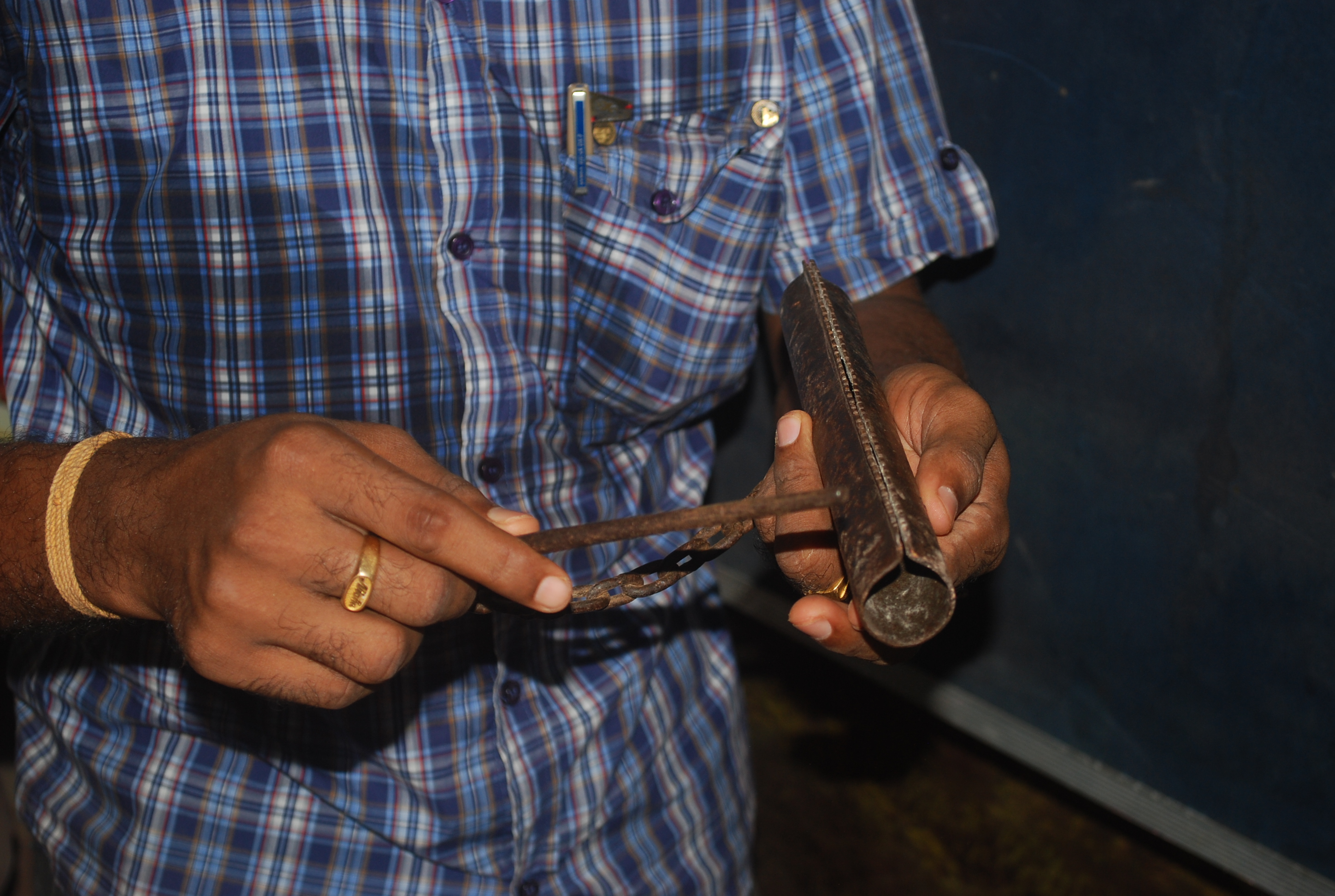 കൊക്കറ എന്ന സംഗീത ഉപകരണം വായിക്കുന്നു.